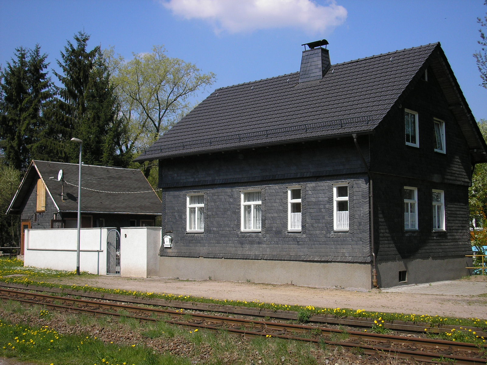 Der Bahnhof Grenzhammer in Ilmenau. Erbaut 1881, stillgelegt 1998.